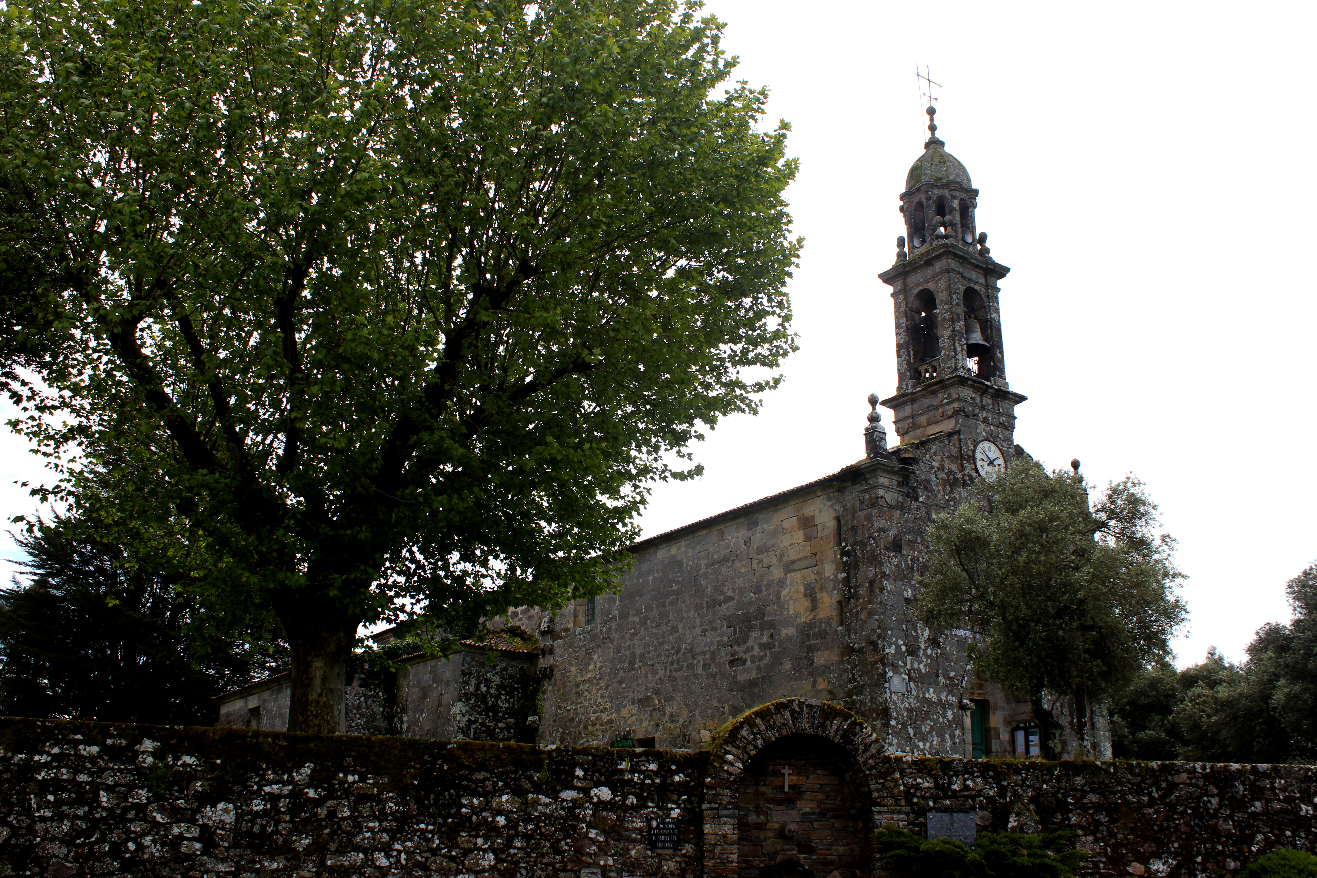 Igrexa de Vedra.